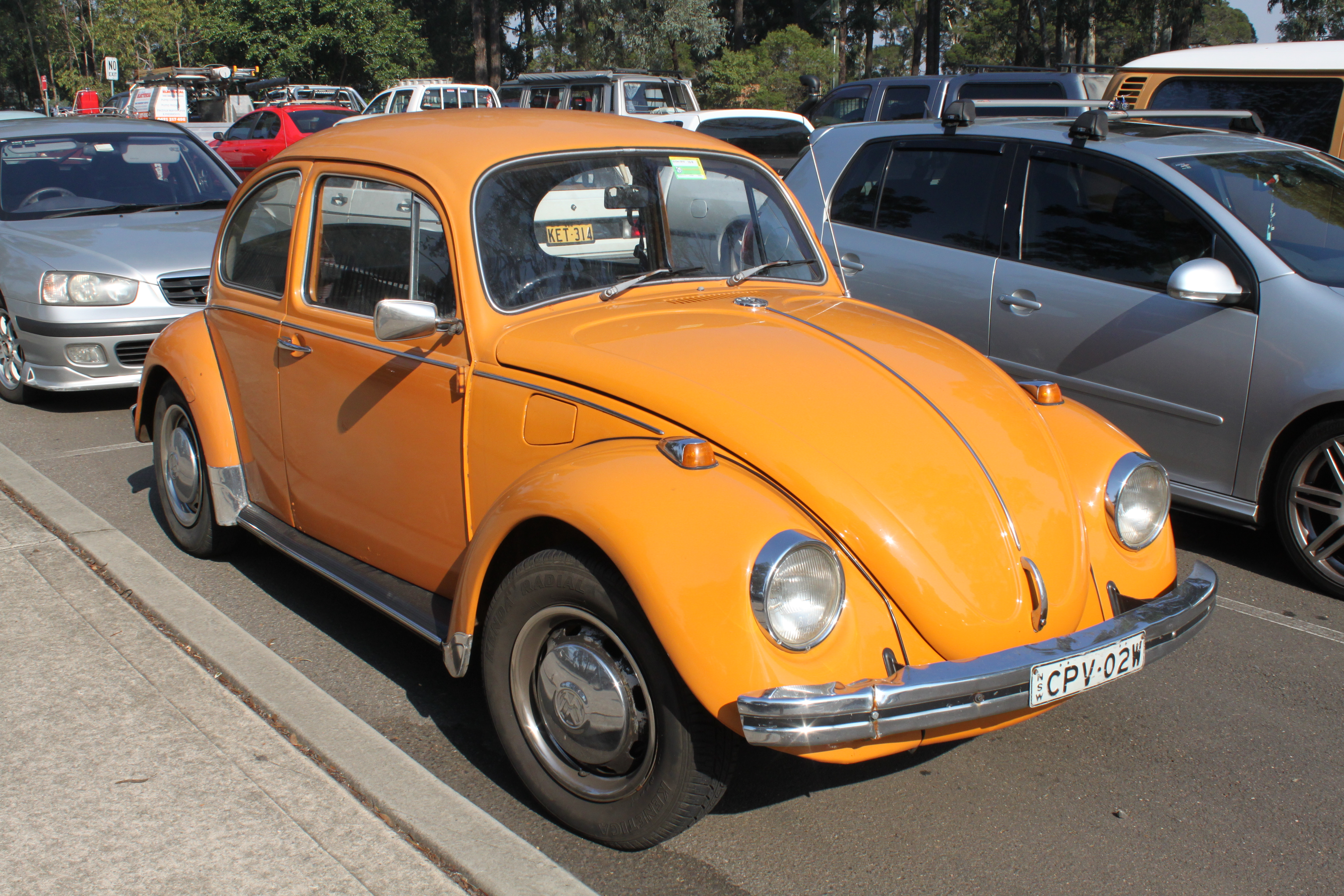 Volkswagen Type 1 Beetle